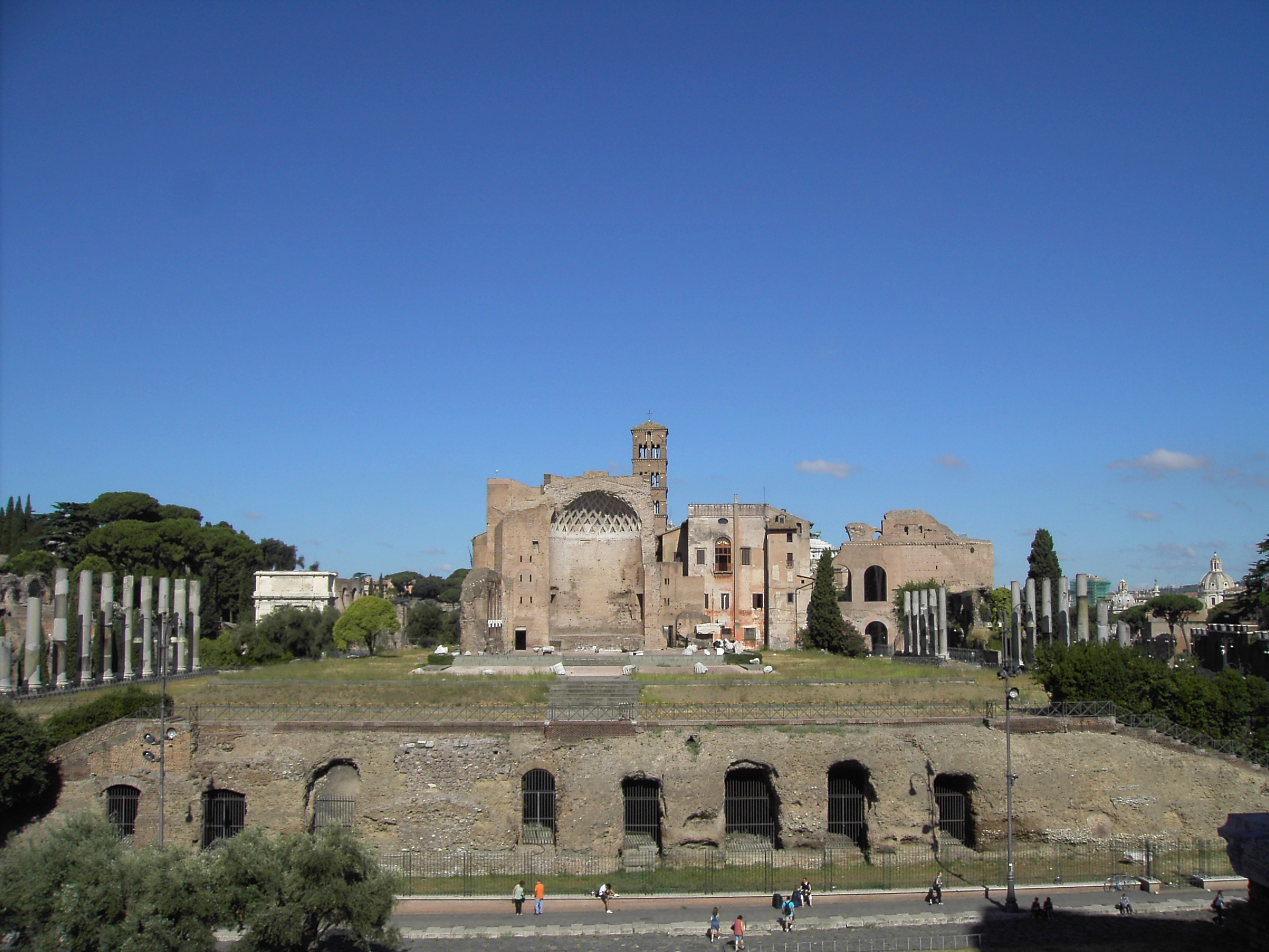 Roma, tempio di Venere e Roma e basilica di Massenzio by Lalupa